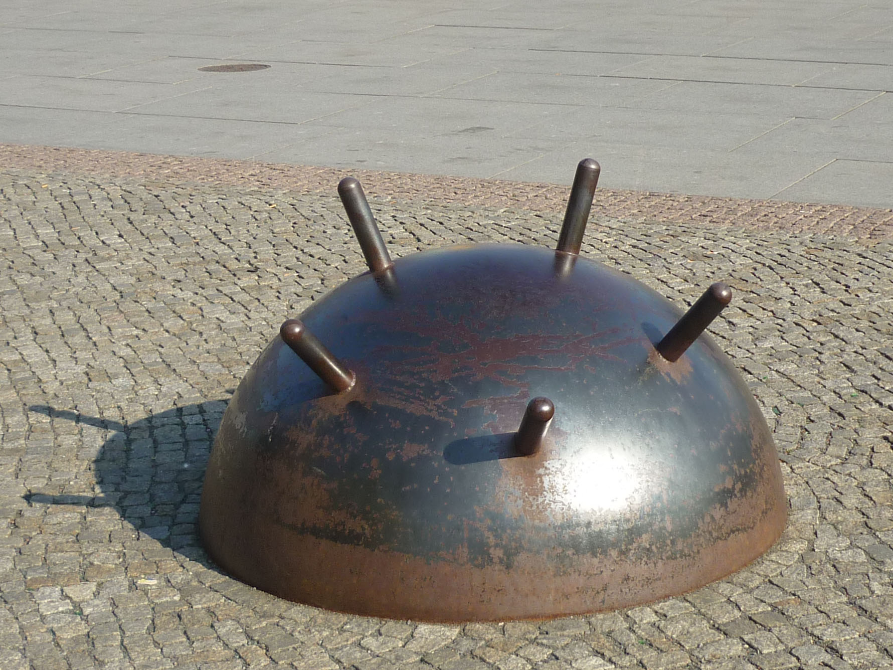 Angela Hampel: Denkmal für den unterirdisch geführten Kaitzbach in Dresden, Pirnaischer Platz